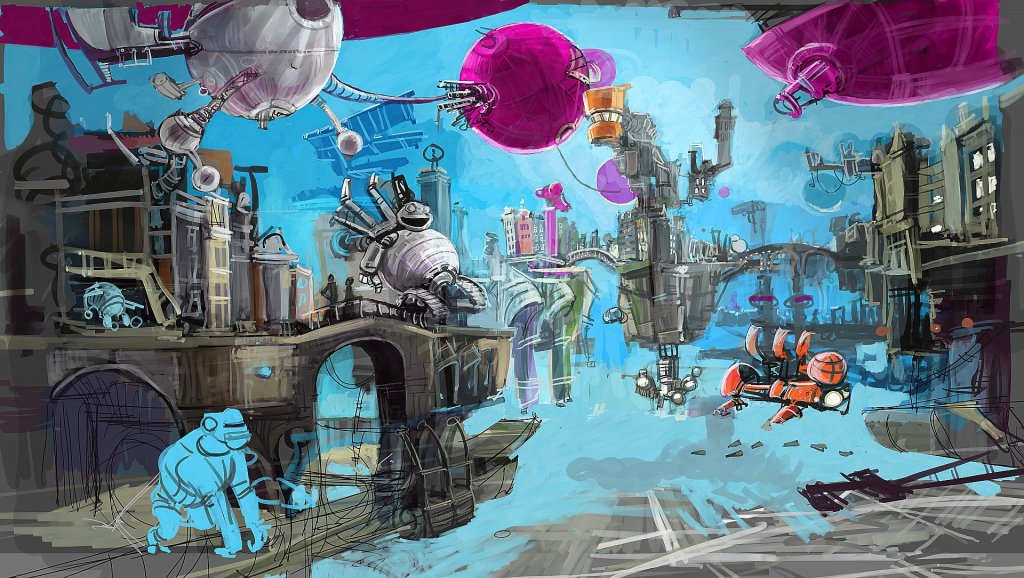 Artwork del nuevo cortometraje del Blender Institute